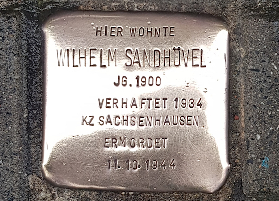 Ort: Königsberger Allee 60, 47058 Duisburg